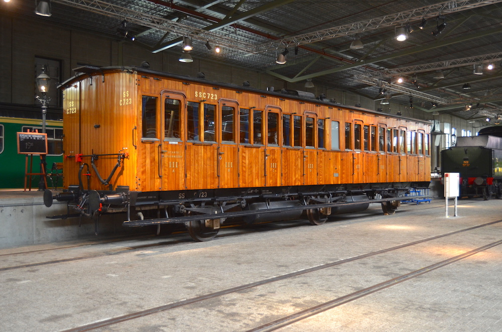 Nederlands Spoorwegmuseum rijtuig SS C 723. Foto: Erik Swierstra.